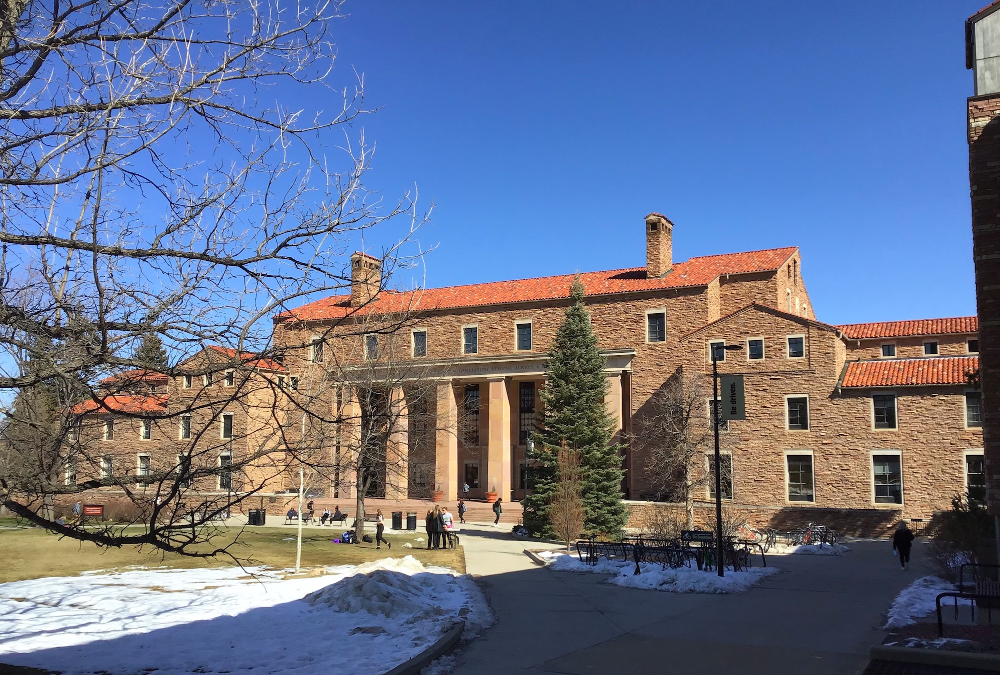 North Side of Norlin Library CU-Boulder